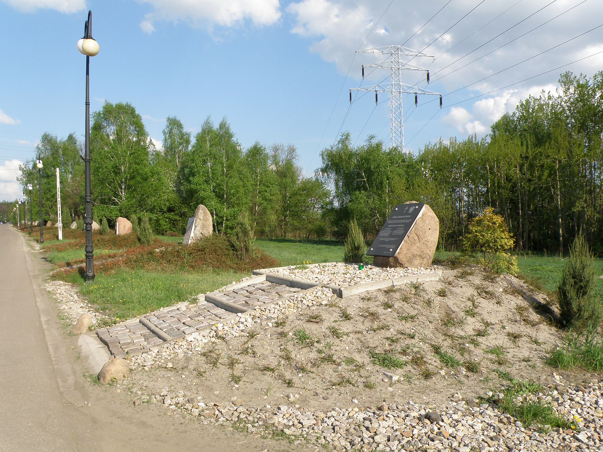 Olszynka Grochowska - Aleja Chwały, ul. Traczy